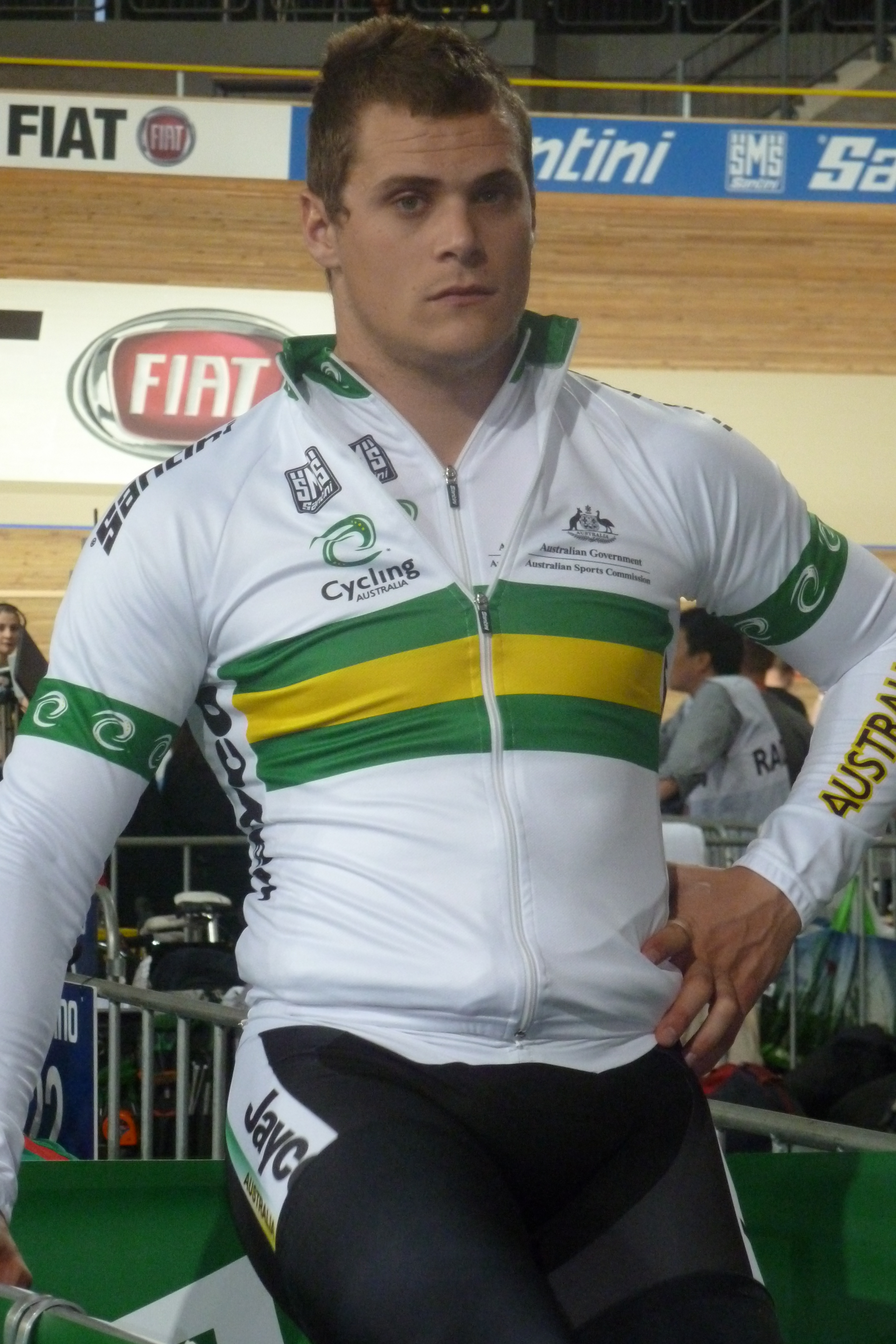 Scott Sunderland, australischer Bahnrad-Rennfahrer